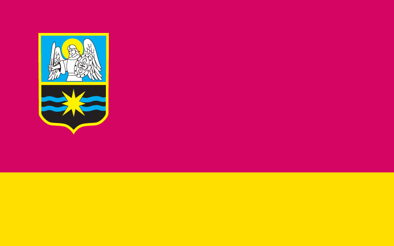 Прапор міста Славутича має форму прямокутника розміром 160 см по горизонталі та 100 см по вертикалі. На полі прапора у лівому верхньому куті на відстані 15 см зверху та 15 см зліва знаходиться зображення герба міста шириною 29 см, висотою 36 см, який обрамлений лінією золотистого кольору шириною в 1 см. Поле прапора поділено на дві частини, верхня (головна частина) висотою 70 см, на якій розміщено герб міста, має малиновий колір, нижня частина висотою 30 см має жовто-золотистий колір. Враховуючи практичність, історичність і звичай: малиновий колір - свобода, слава, символ козацької перемоги; жовто-золотистий колір - сонце, багатство, сила і вдача. Прапор міста виготовляється із шовкової тканини